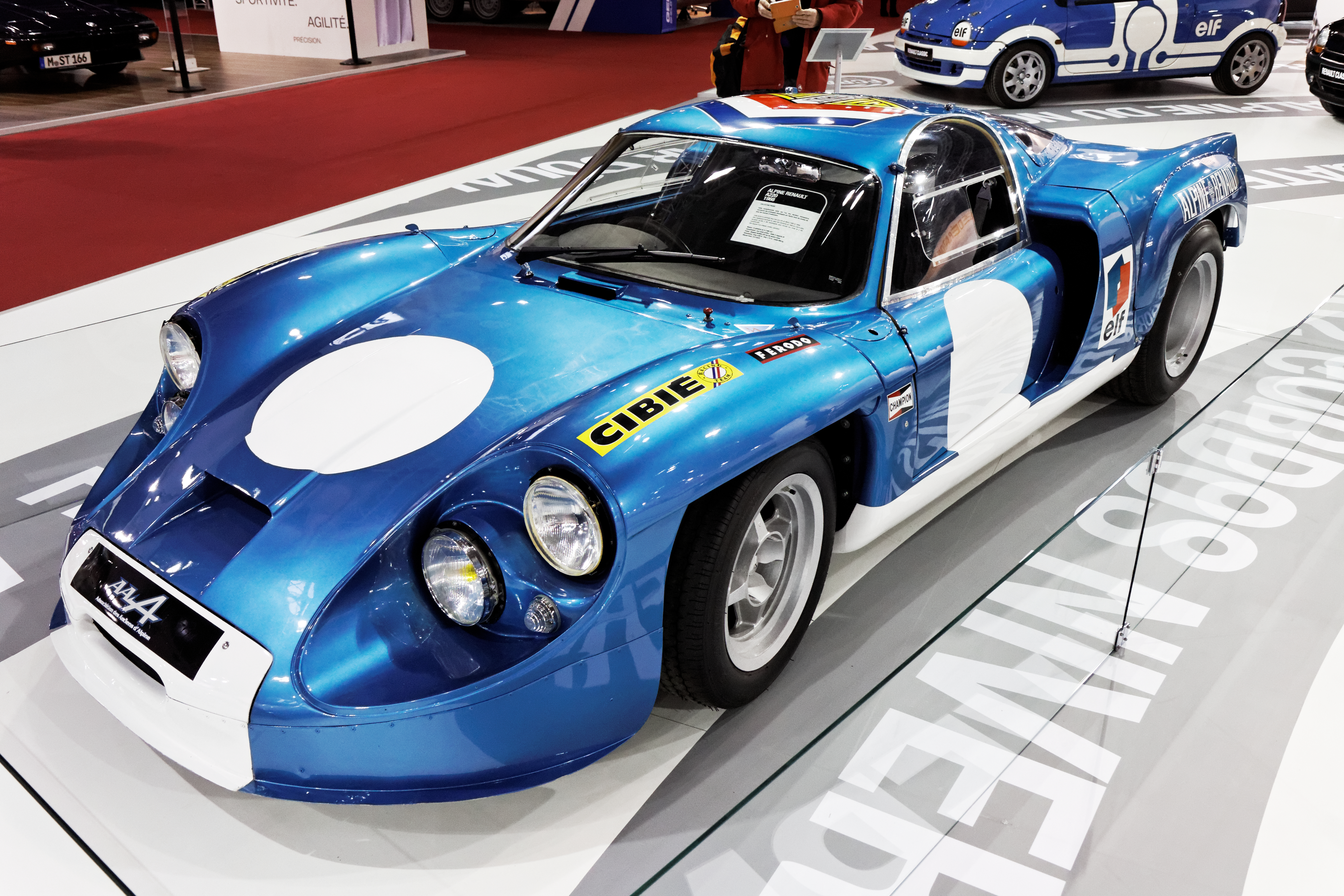 Une Alpine Renault A220 présentée lors du salon retromobile 2013.